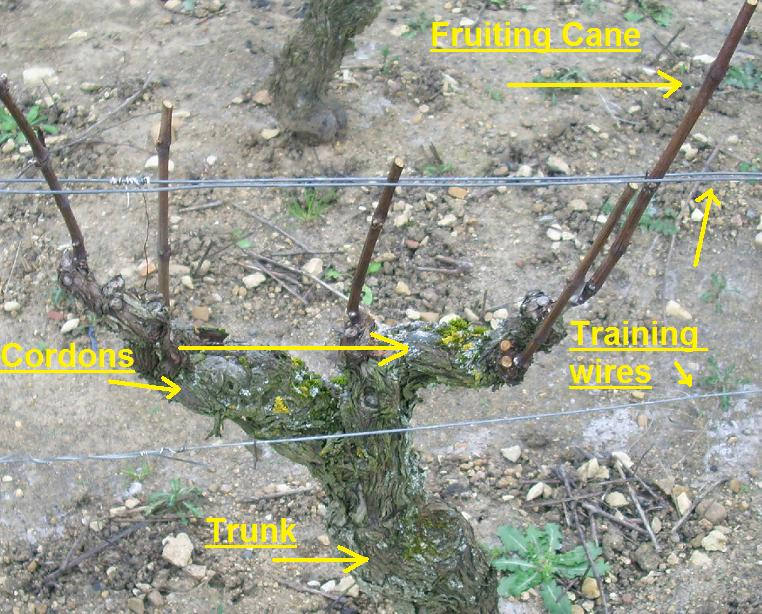 Pied de vigne taillé en Gobelet